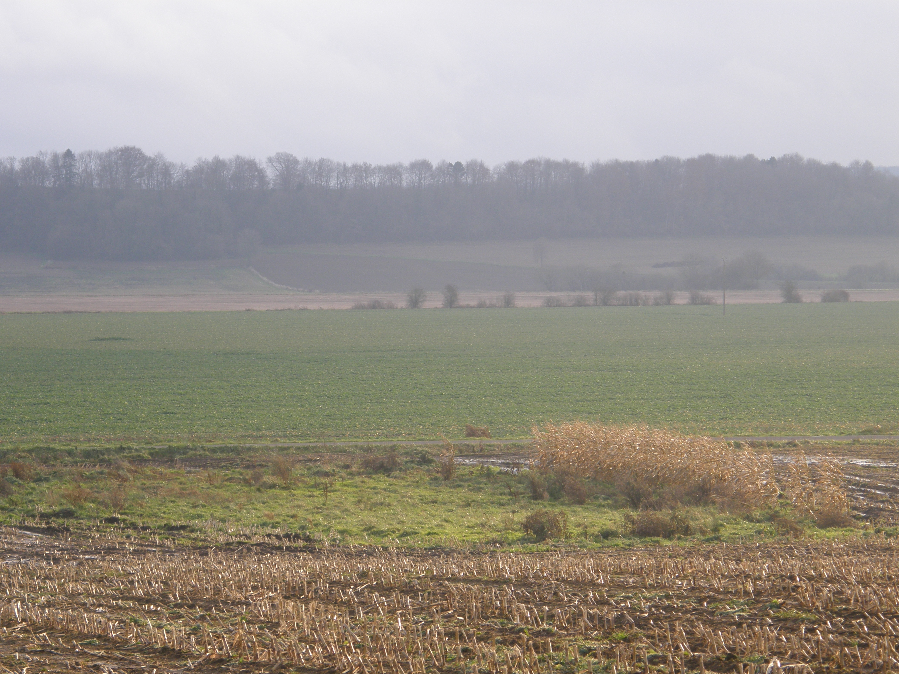 Réville-aux-Bois (Meuse). Zone humide dans un champ de maïs, après le retournement d'une prairie.